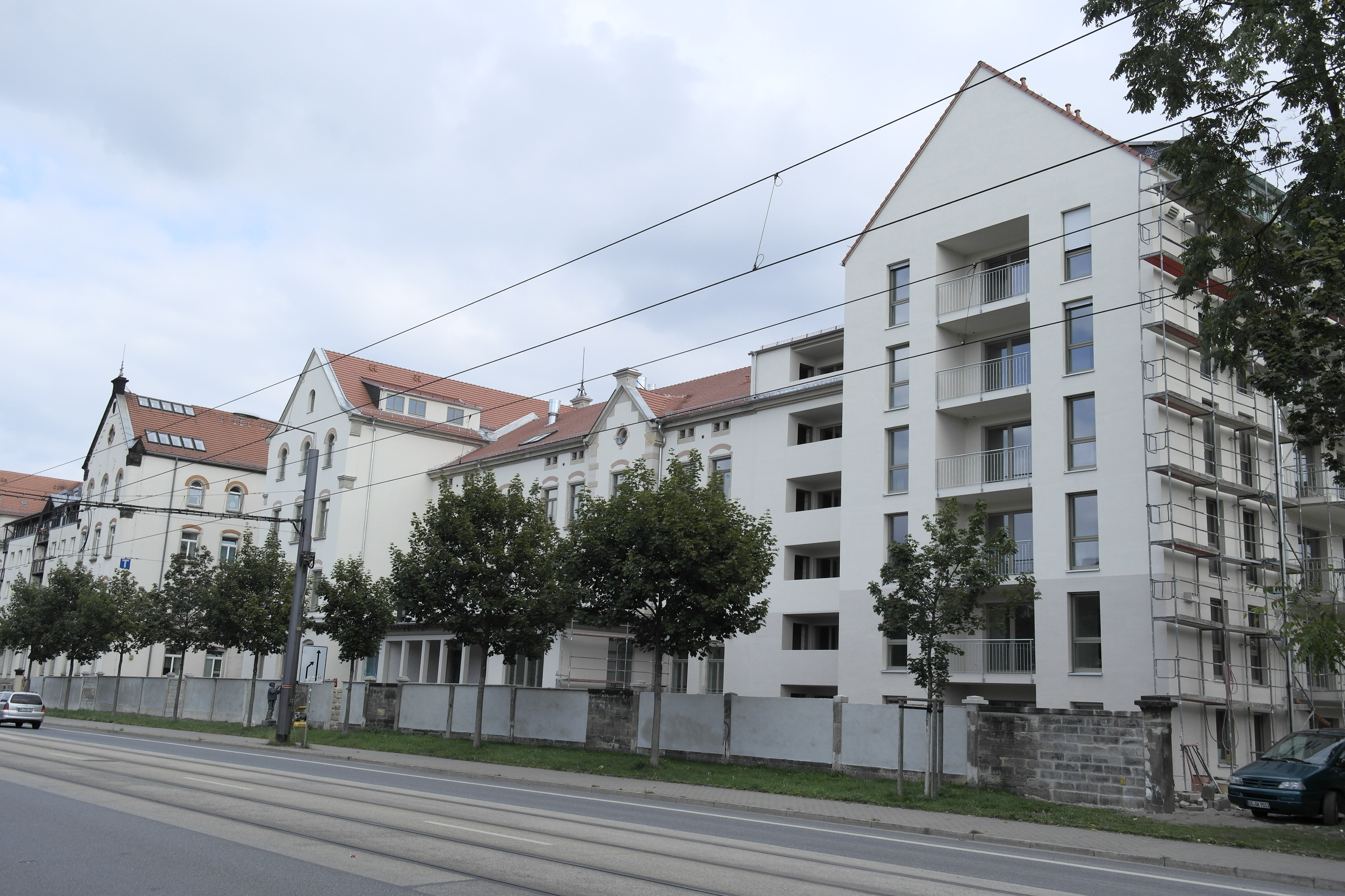 Dresden,Löbtauer Strasse, Pflegeheim, Wiederaufbau